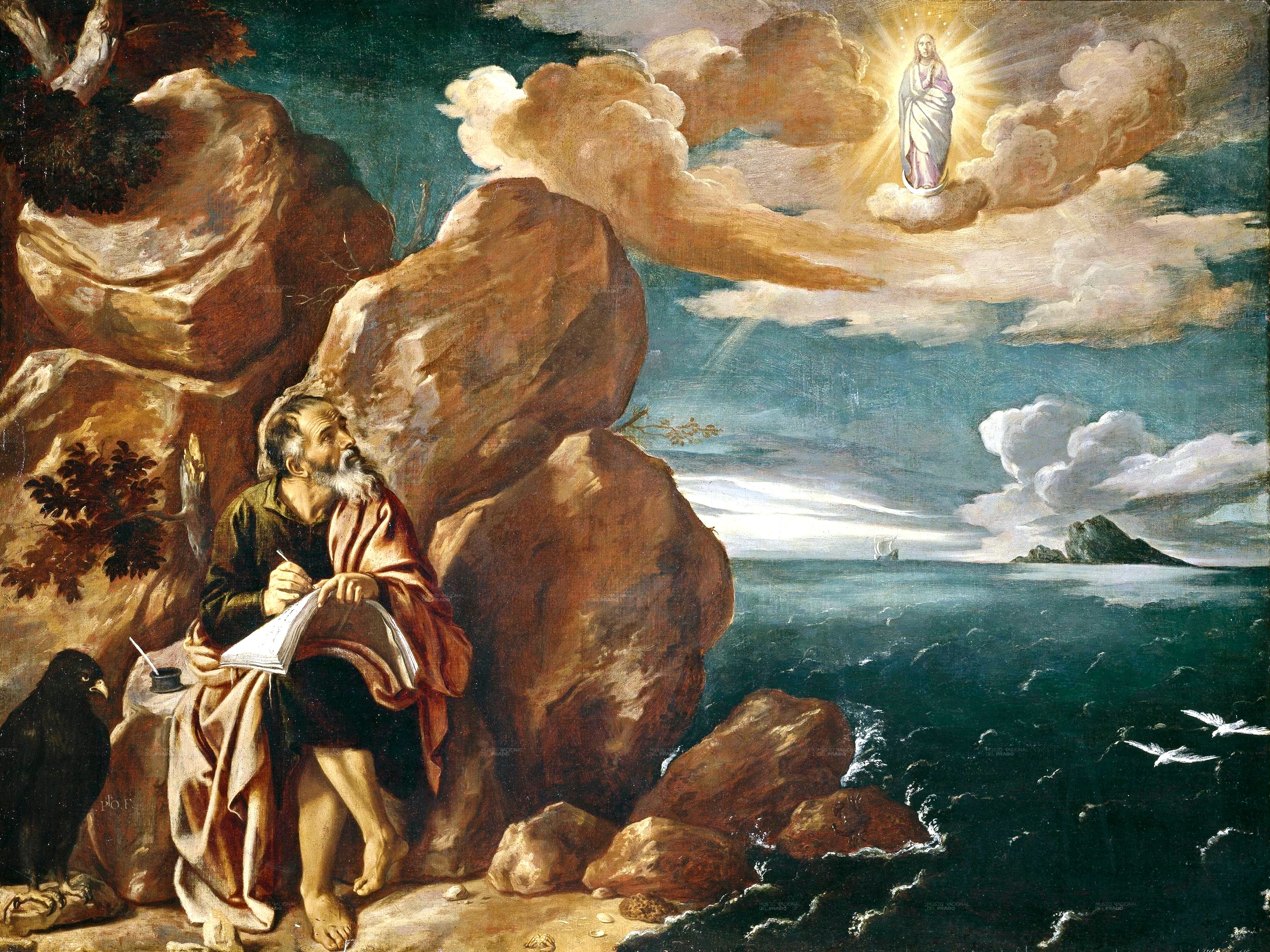 La obra representa al apóstol San Juan Evangelista mientras se hallaba desterrado en la isla de Patmos, donde según la tradición escribió el libro del Apocalipsis.